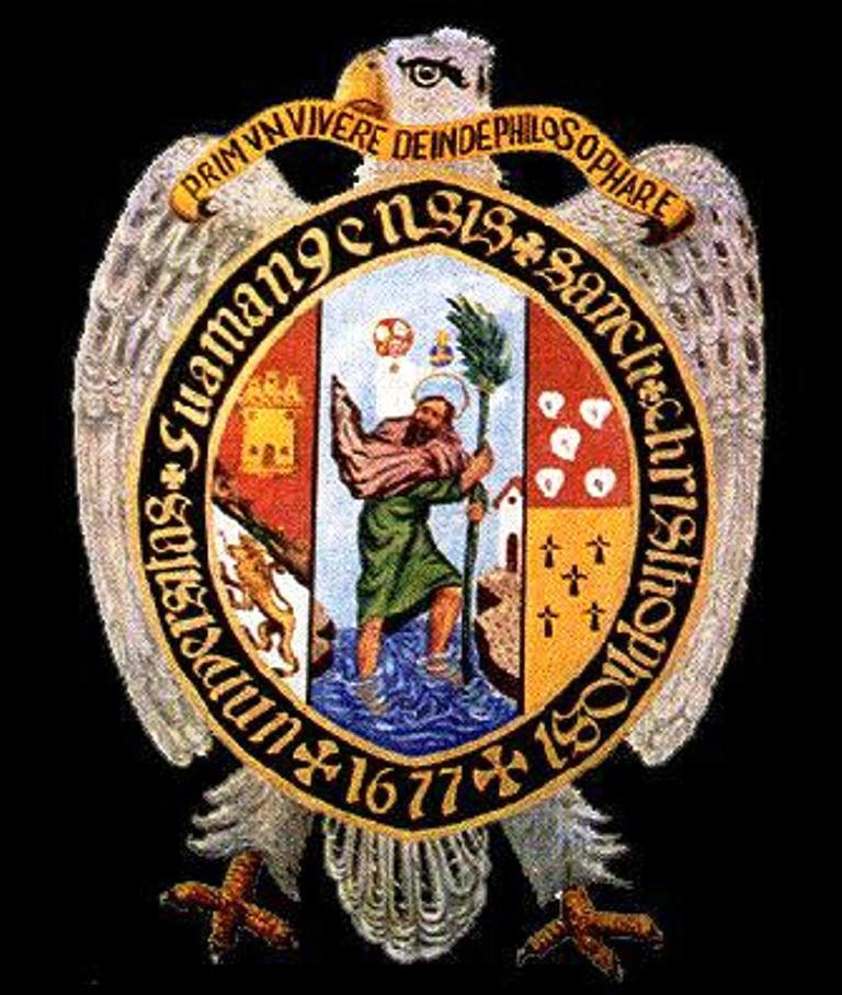 Universidad Nacional de San Cristobal de Huamanga